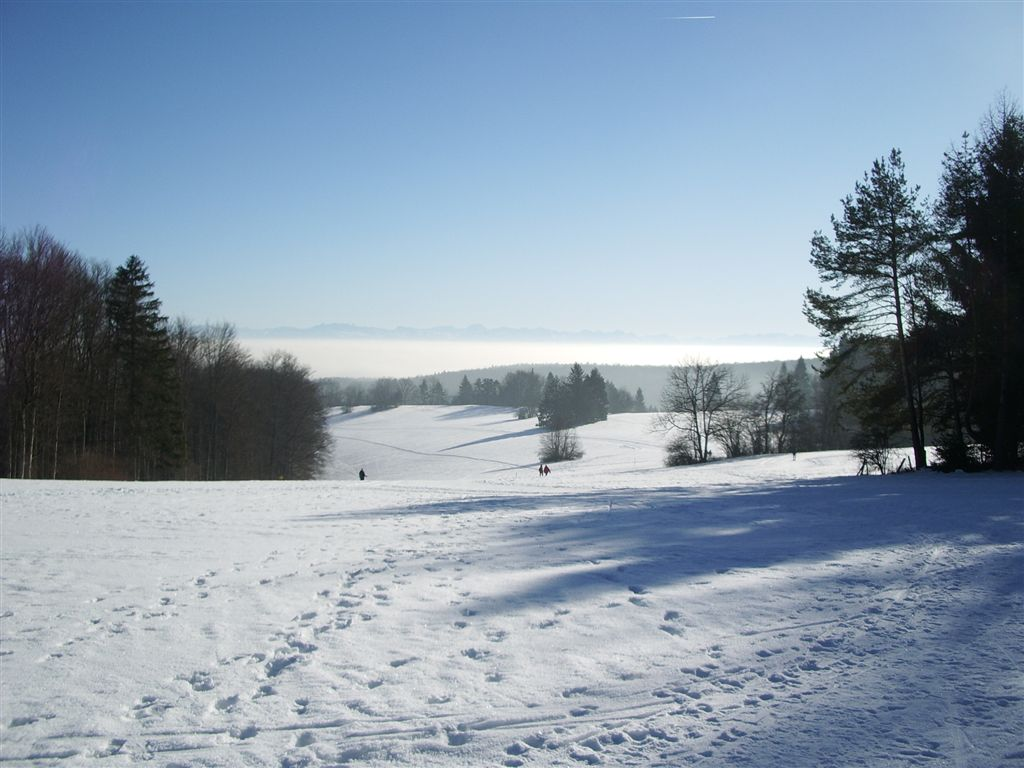 Randen: Blick vom Zelgli auf die Alpen Bild im Januar 2006 selbst gemacht. Randen Kanton Schaffhausen